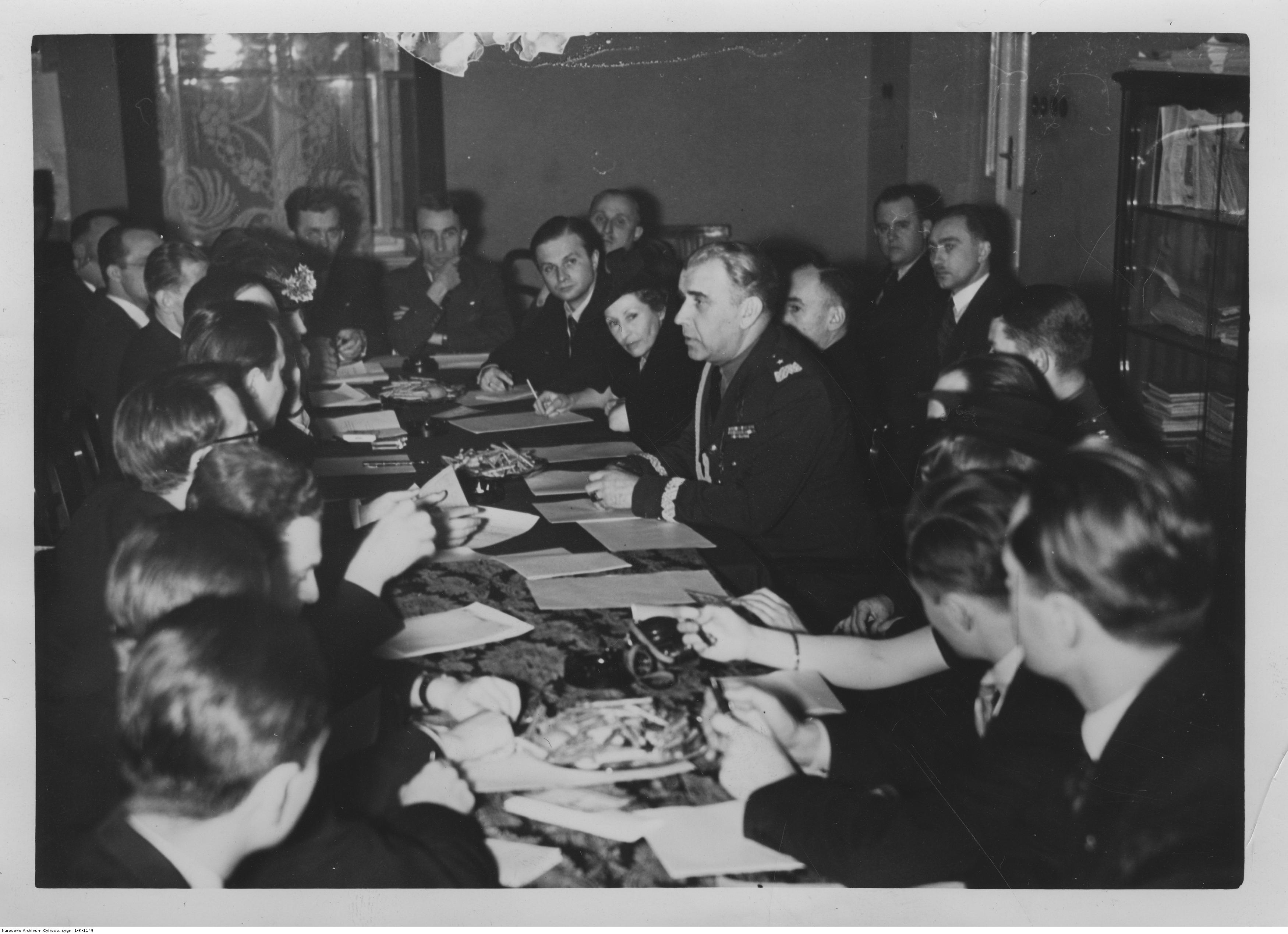 Konferencja prasowa nowo mianowanego generała lotnictwa Władysława Kalkusa w Klubie Sprawozdawców Lotniczych w Warszawie. Koncern Ilustrowany Kurier Codzienny - Archiwum Ilustracji. Sygnatura: 1-K-1149